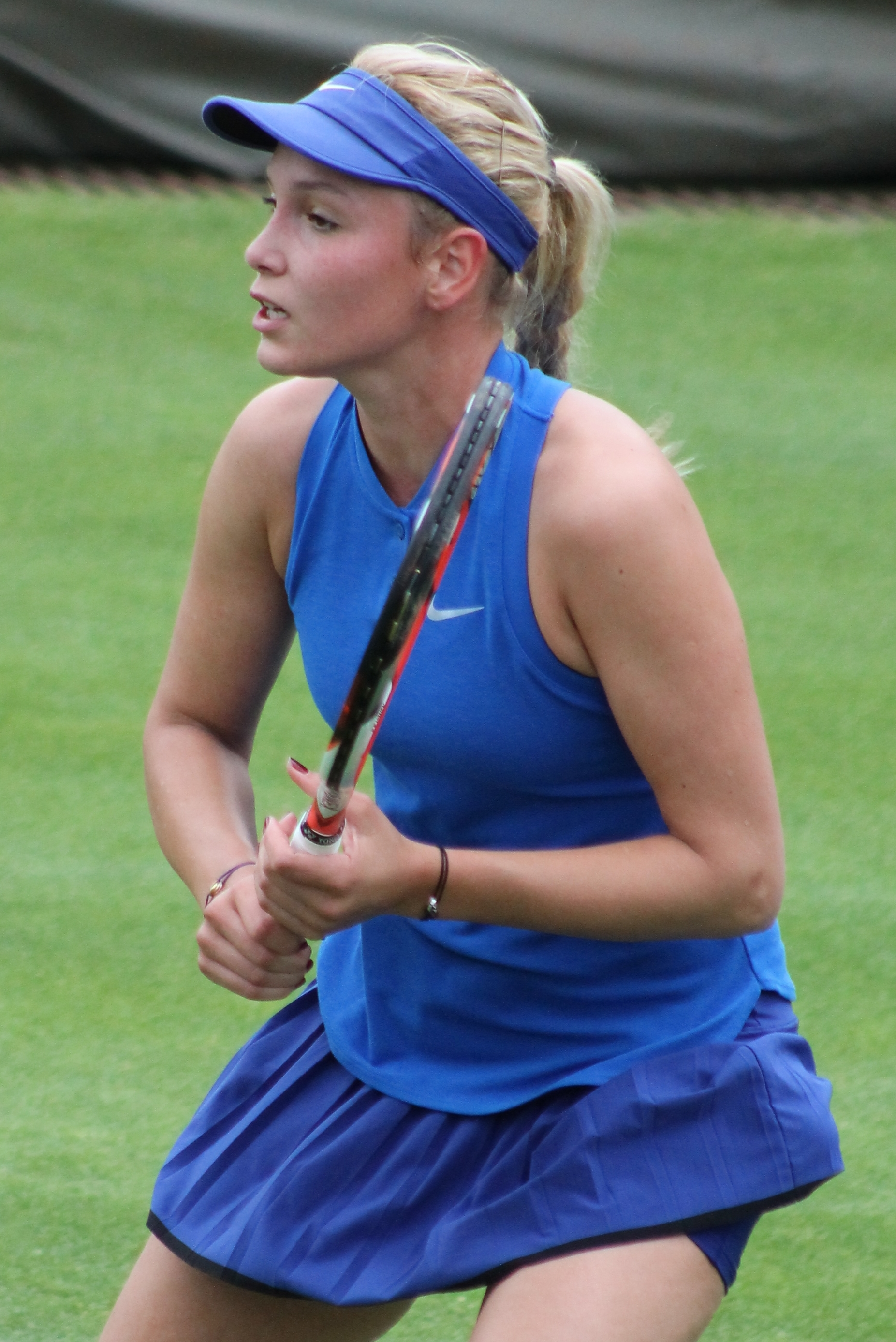 Vekic BM16 (12)